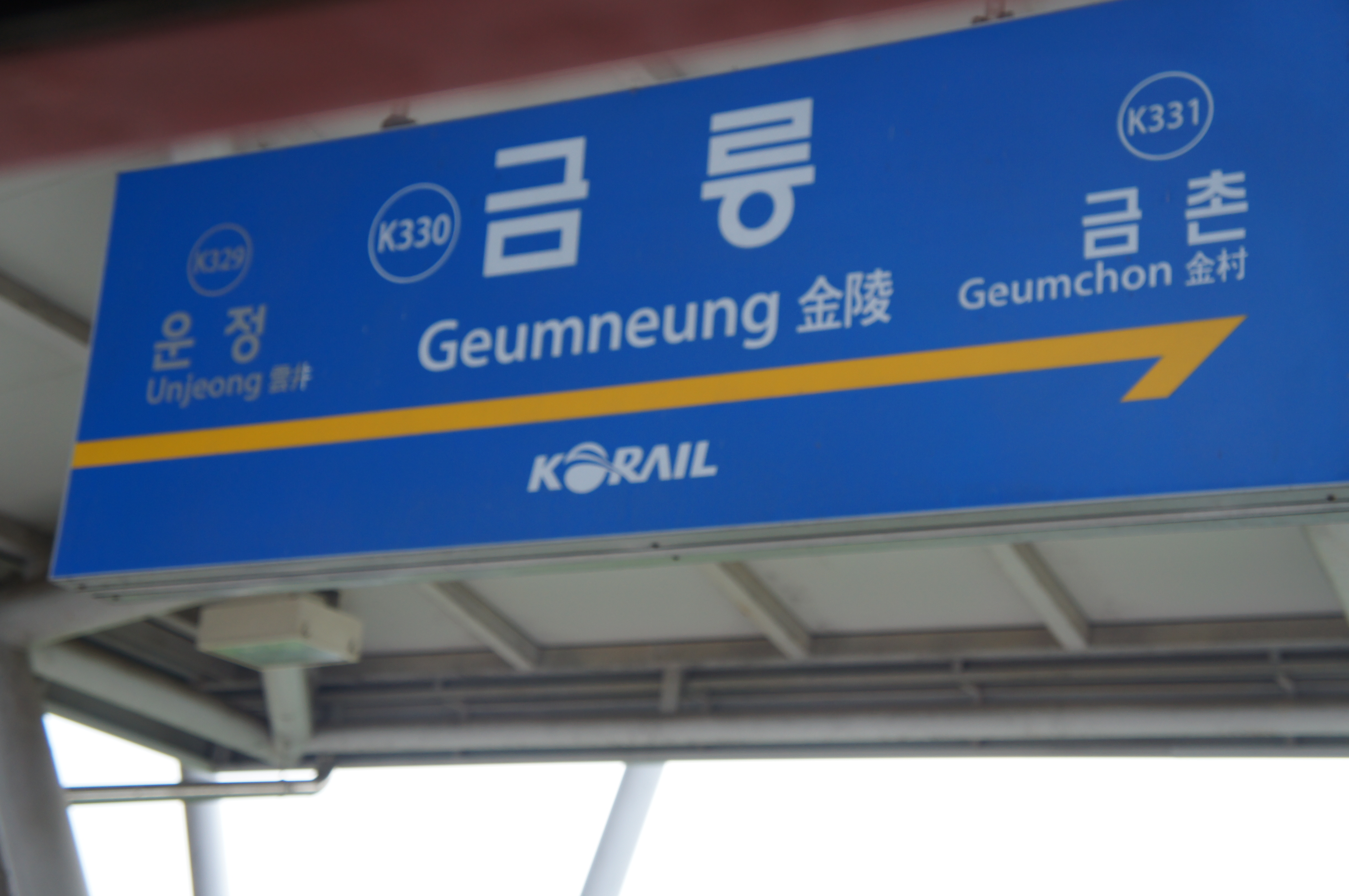 금릉역 역명판